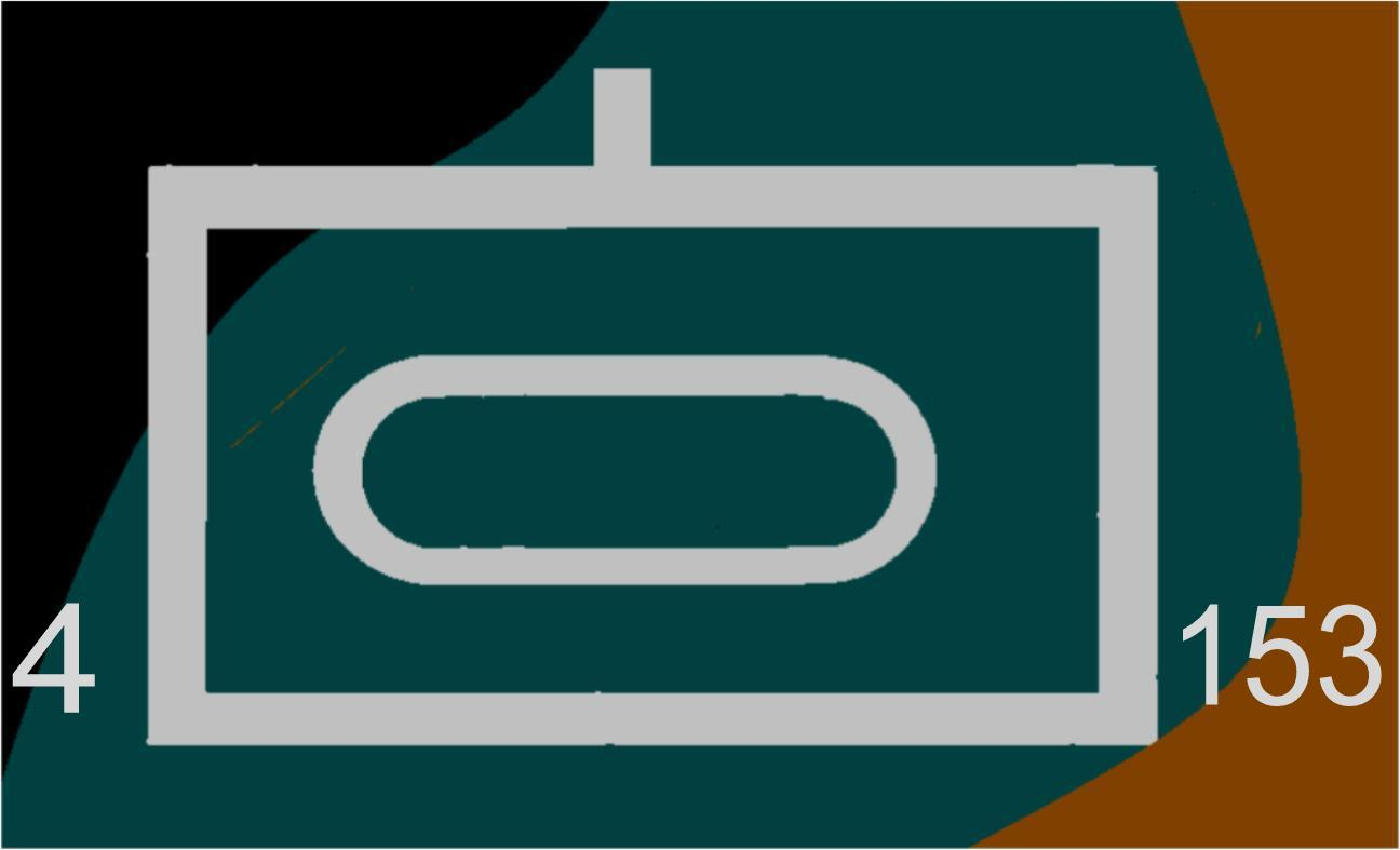 Taktisches Zeichen Panzerbataillon 153 (PzBtl 153) (Bundeswehr)